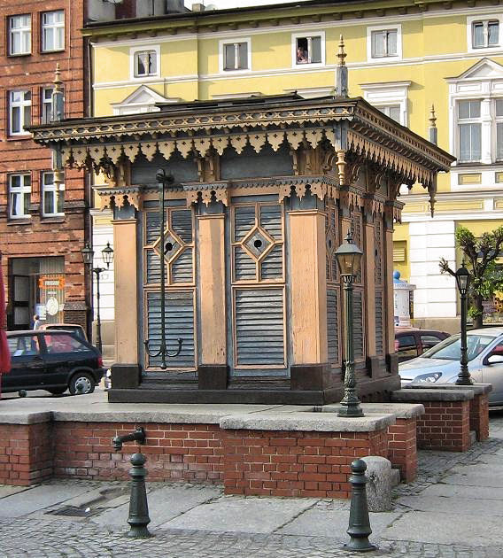 Zabytkowa studnia Bł. Bernarda w Grodzisku Wielkopolskim